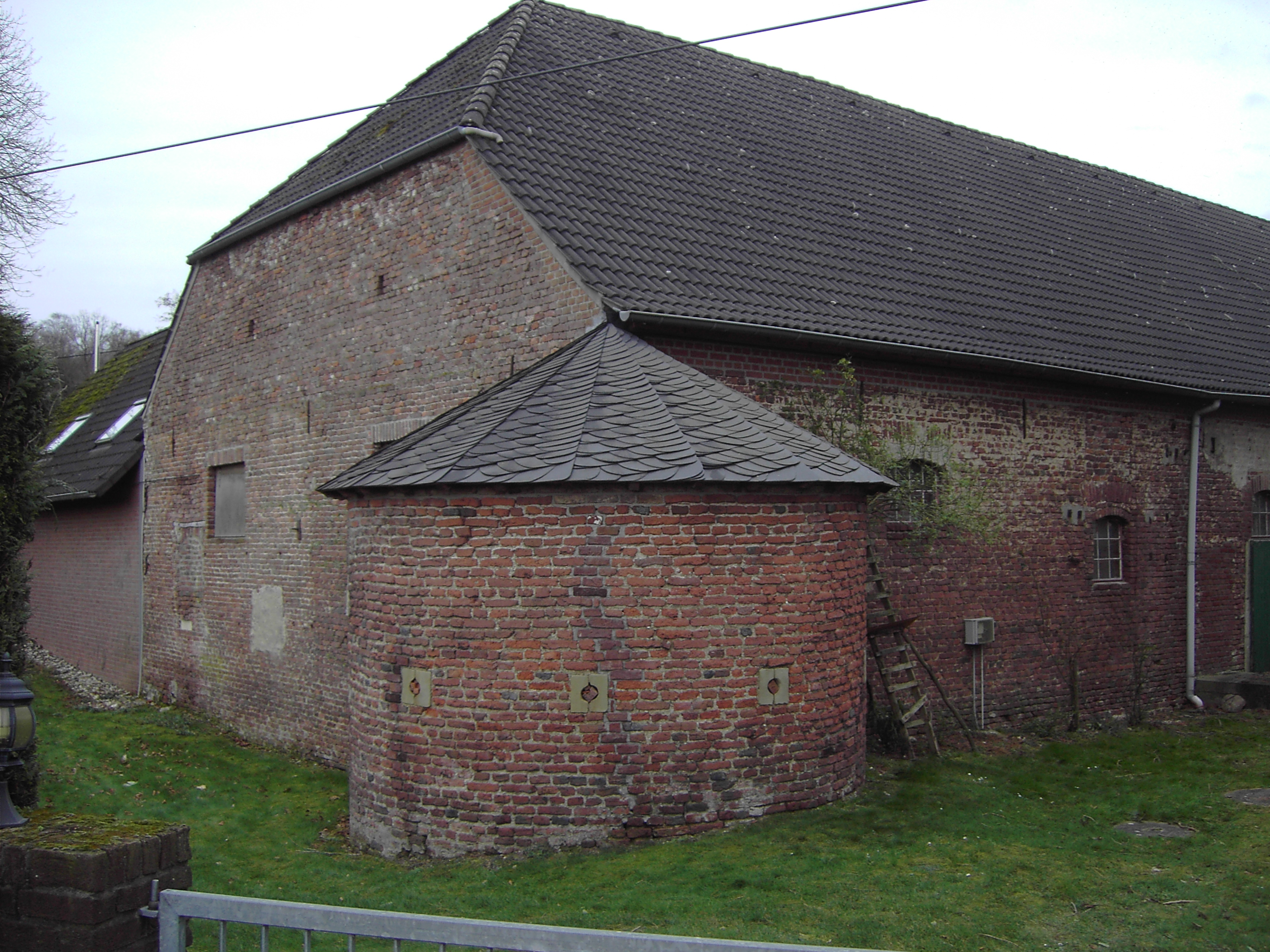 Kamp-Lintfort, Haus Eyll, Nebengebäude mit alten Rundturm